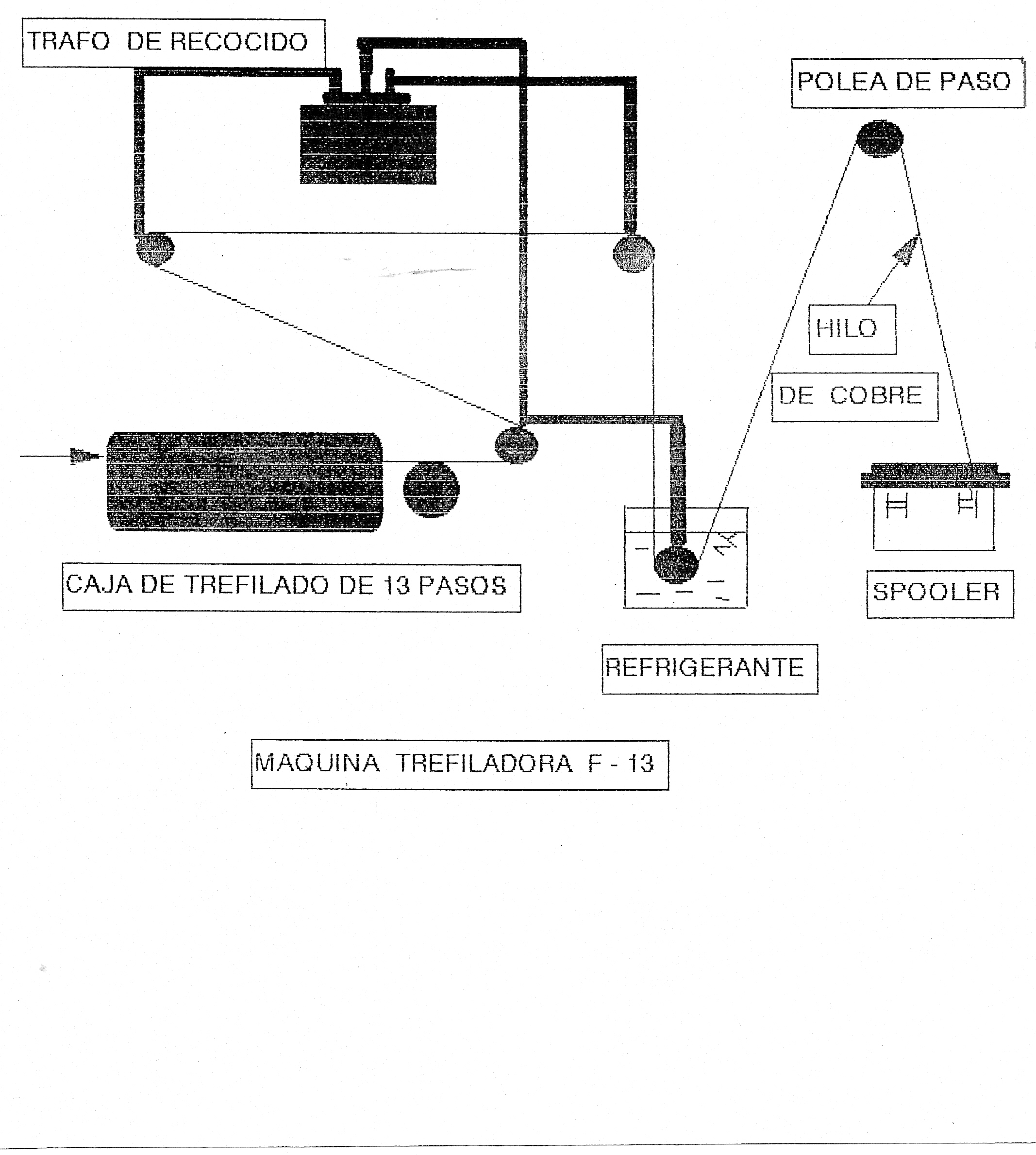 Trefiladora